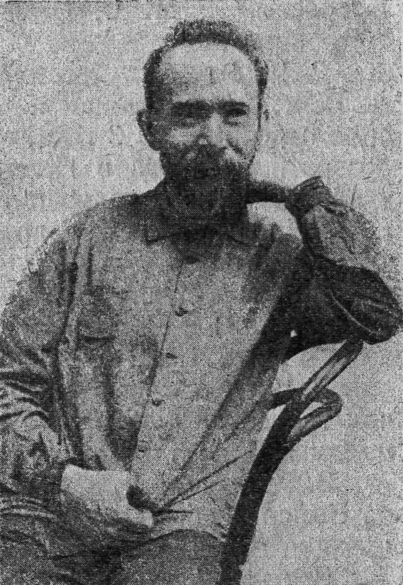 Деятель российского рабочего движения Алексей Егорович Карелин (1969 - после 1925)